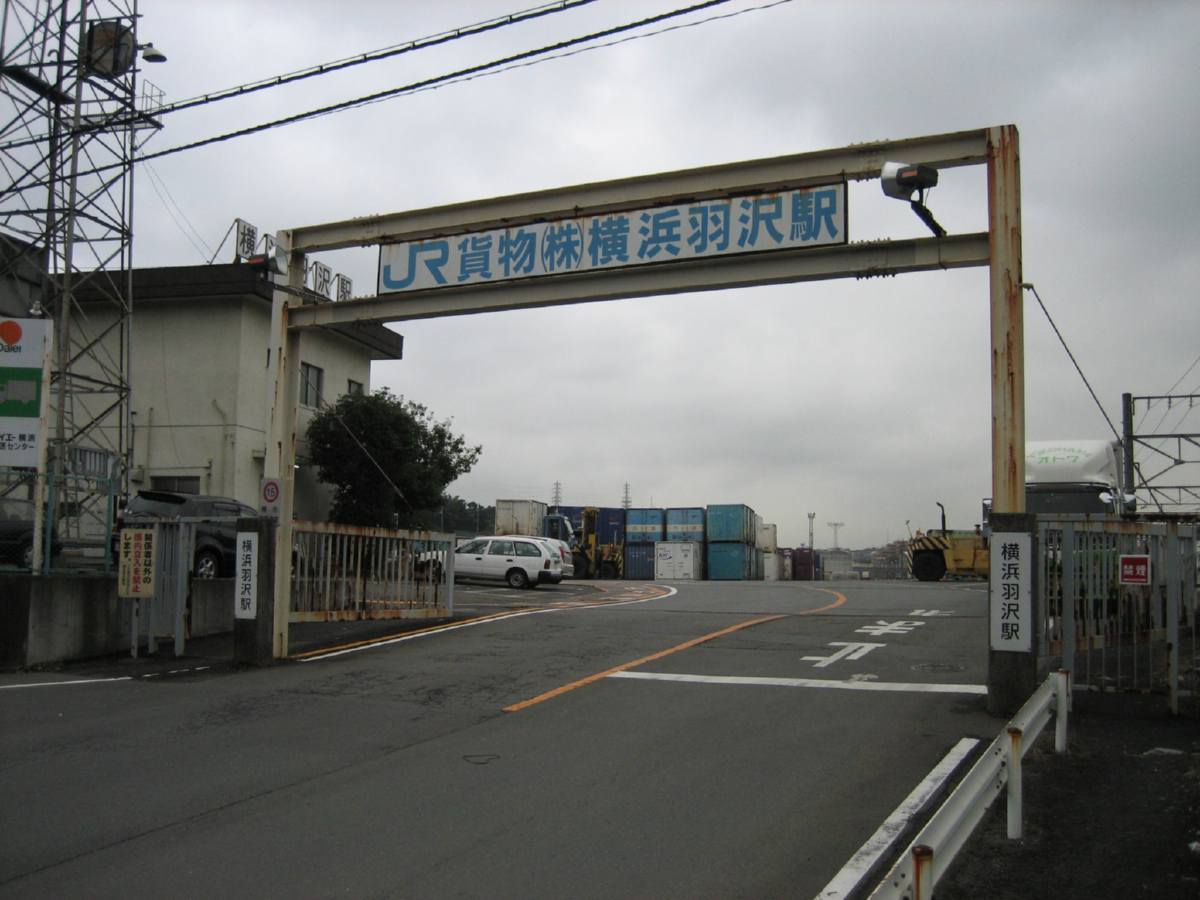 横浜羽沢駅入口・左側が駅舎